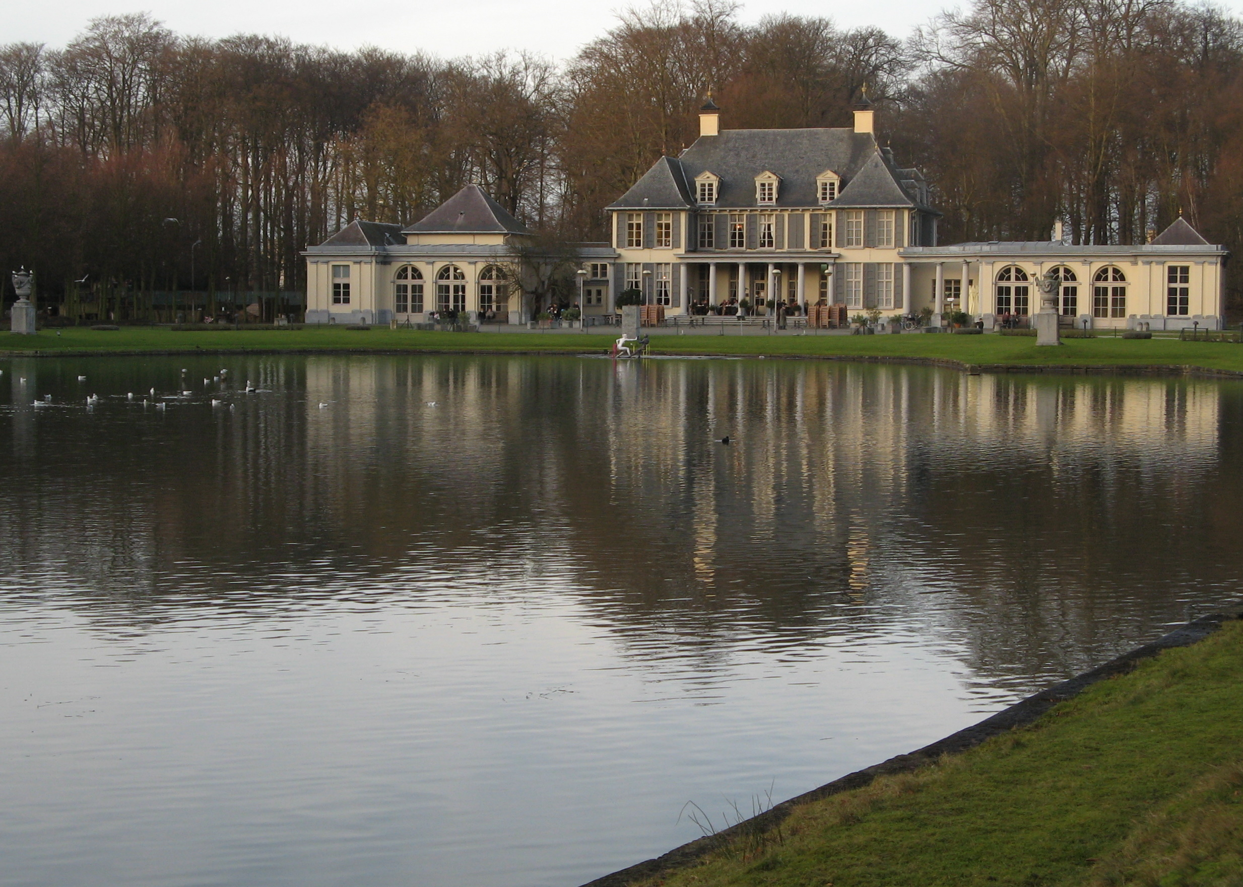 Rivierenhof, Antwerp, Belgium